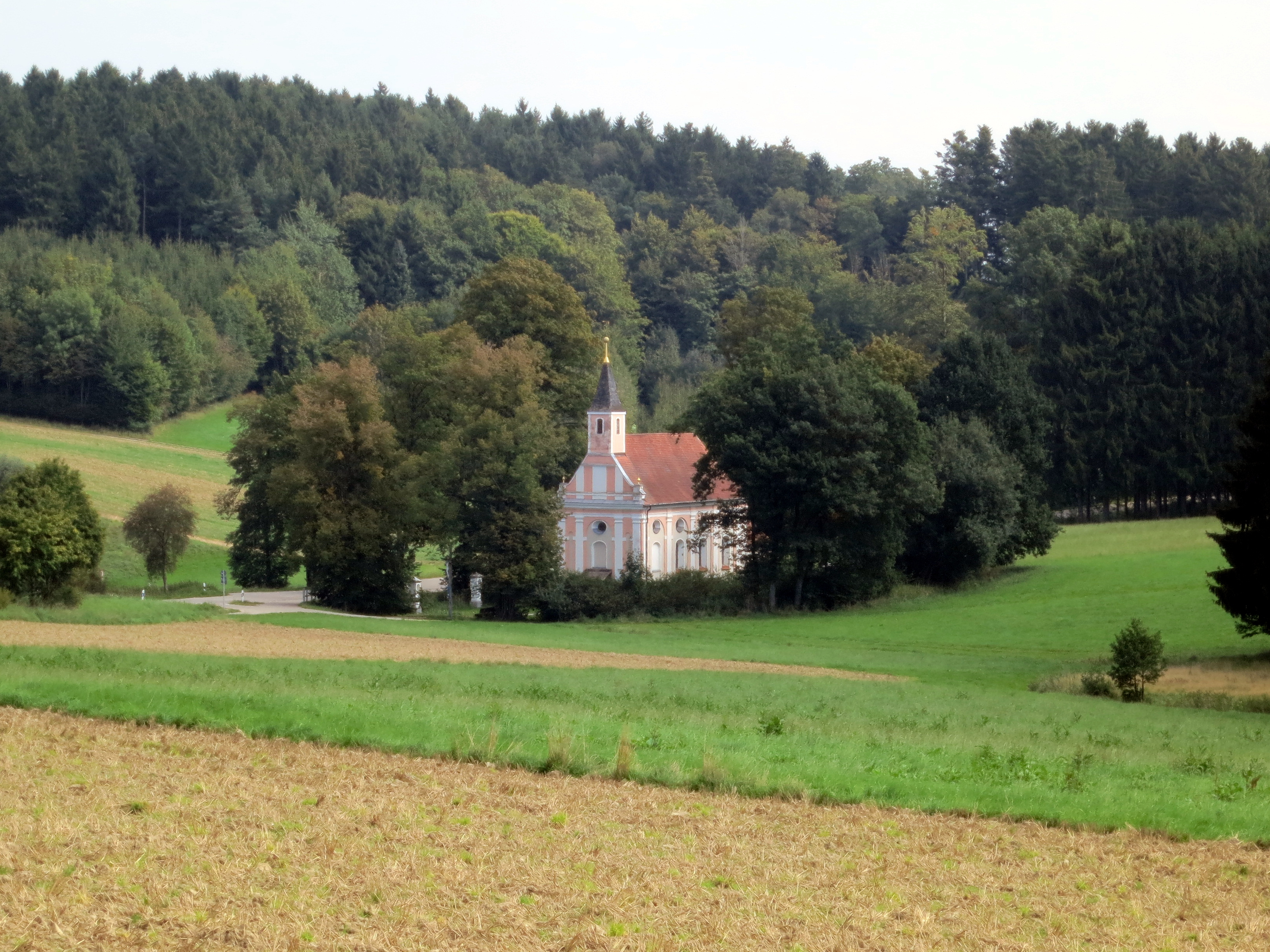 Die katholische Kirche St. Wolfgang bei Pipinsried. Ansicht aus West